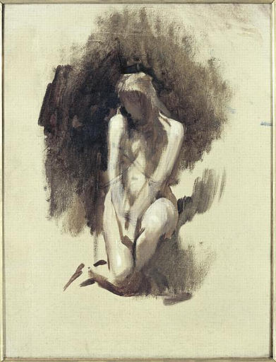 Donna nuda inginocchiata, 31,5 x 27 cm, Musée d'Orsay, Parigi